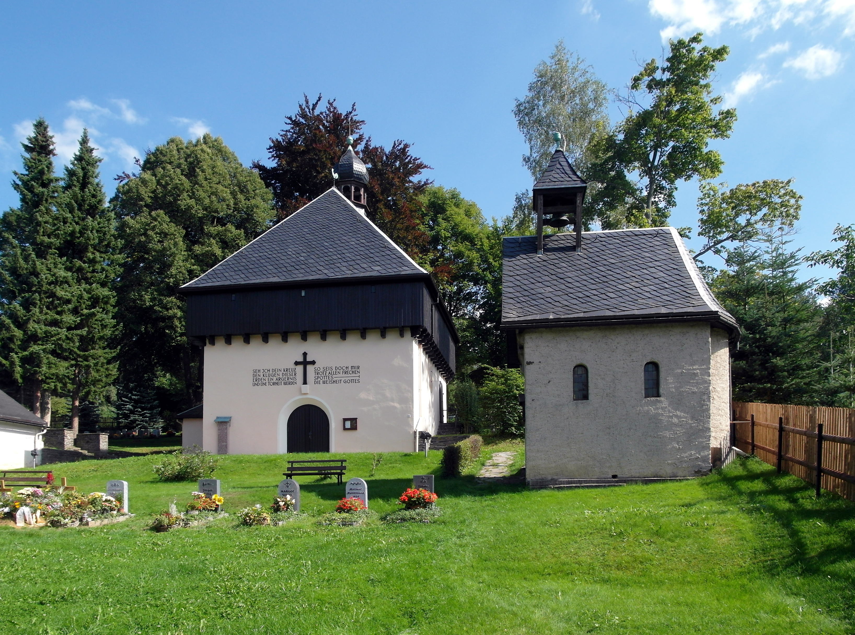 05.09.2017 09518 Mauersberg (Großrückerswalde), An der Kapelle (GMP: 50.608322,13.090924): Kreuzkapelle Mauersberg (1949-53), der 1889 abgerissenen Wehrgangkirche nachempfunden. Rechts die Familiengruft der Familie Mauersberger. Erbaut 1950 nach dem Vorbild altböhmischer Wegkapellen. Grablege von Kreuzkantor Prof. D. Dr. h.c. Rudolf Mauersberger. [SAM1795.JPG]20170905405DR.JPG(c)Blobelt